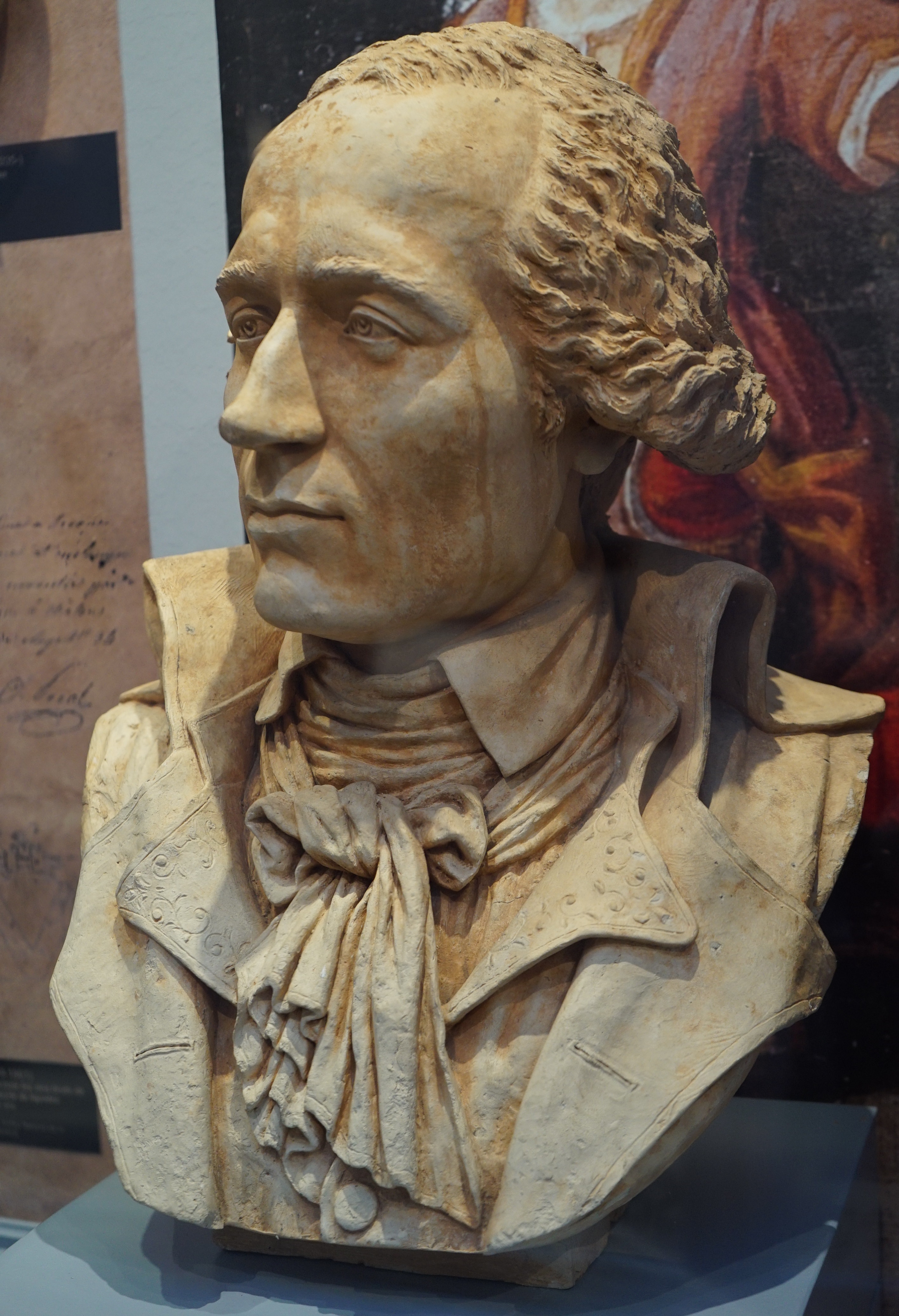 lors d'une exposition temporaire.